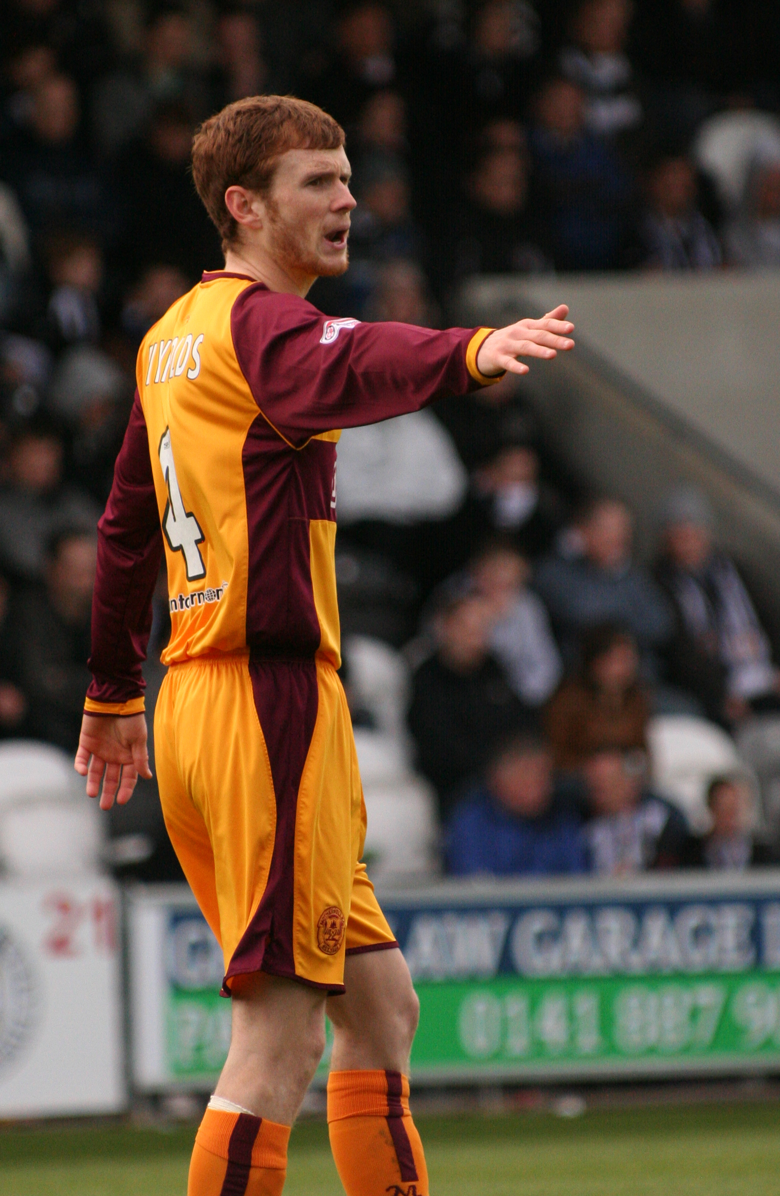 Defence